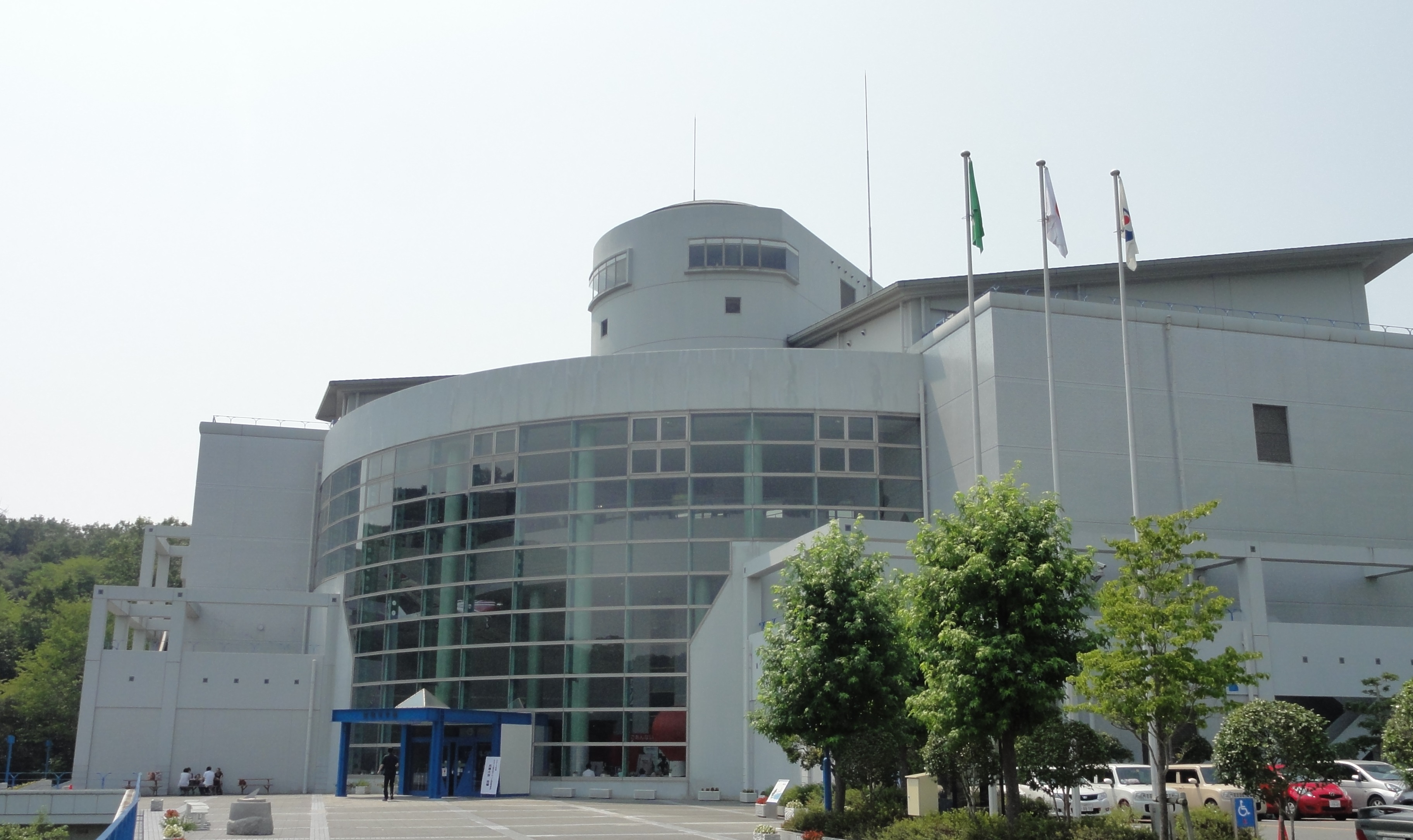 兵庫県姫路市にある姫路科学館です。